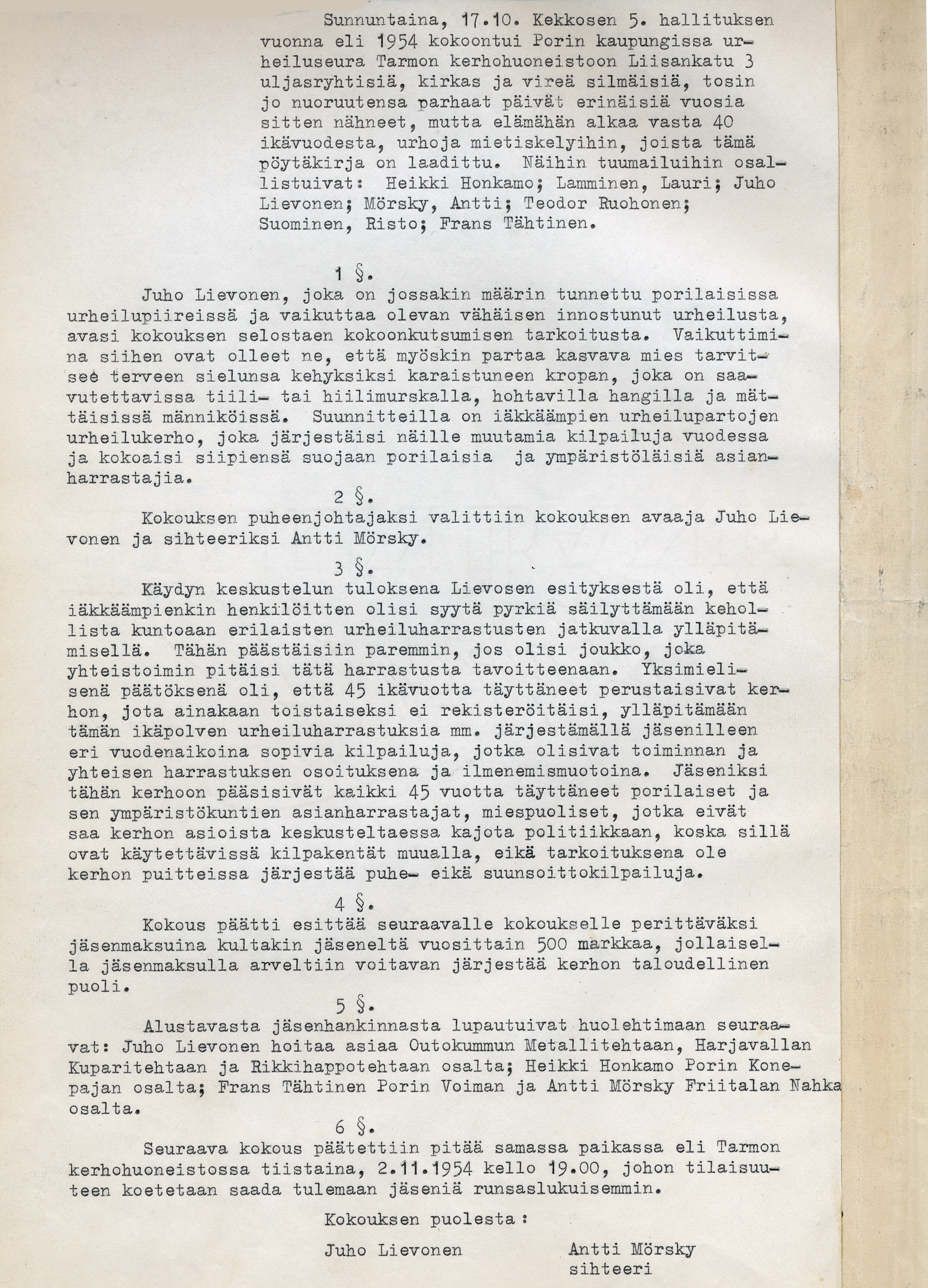 PUVn aloituskokouksen pöytäkirja 1954